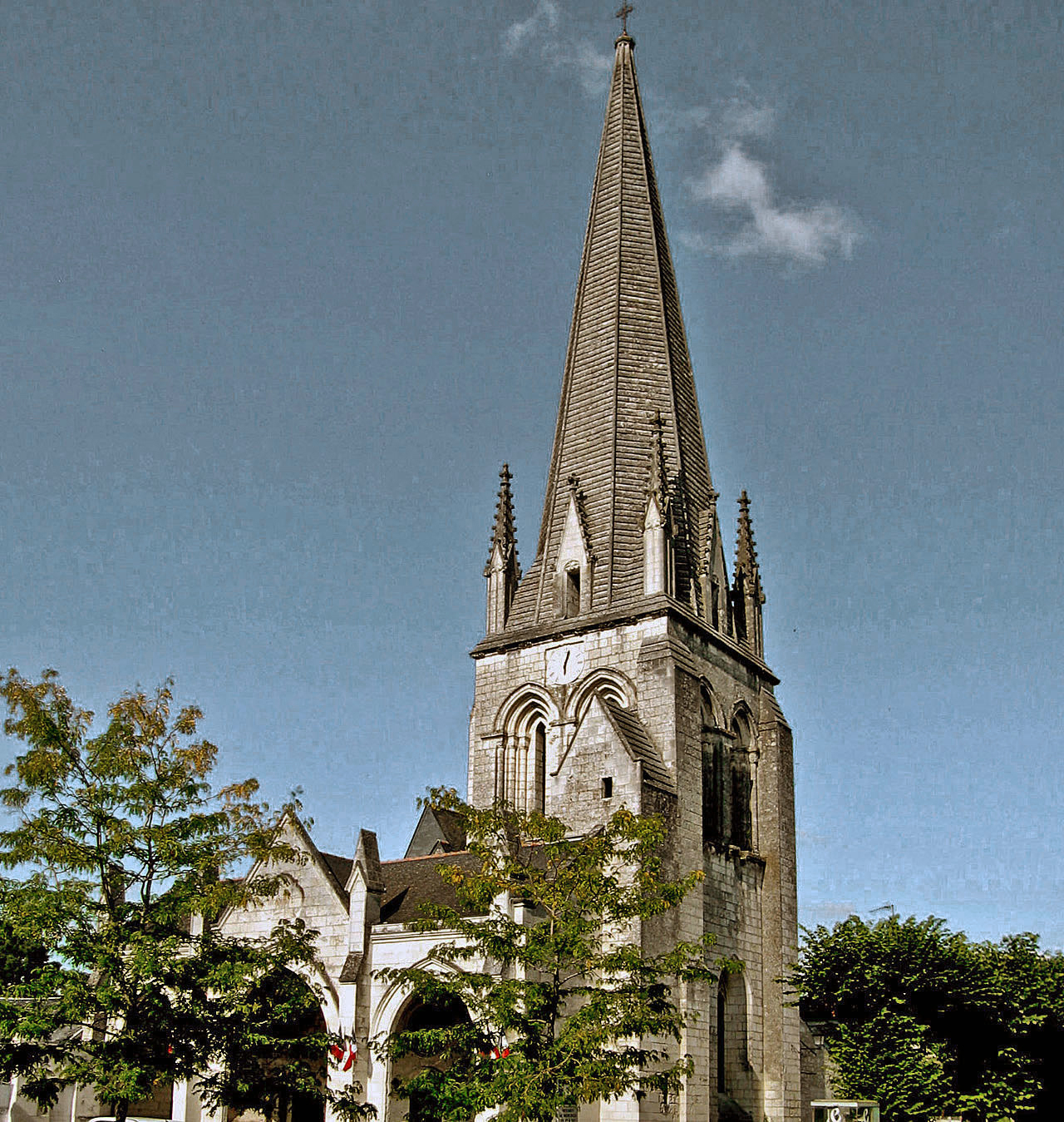 12è 13è 15è 17è siècle .